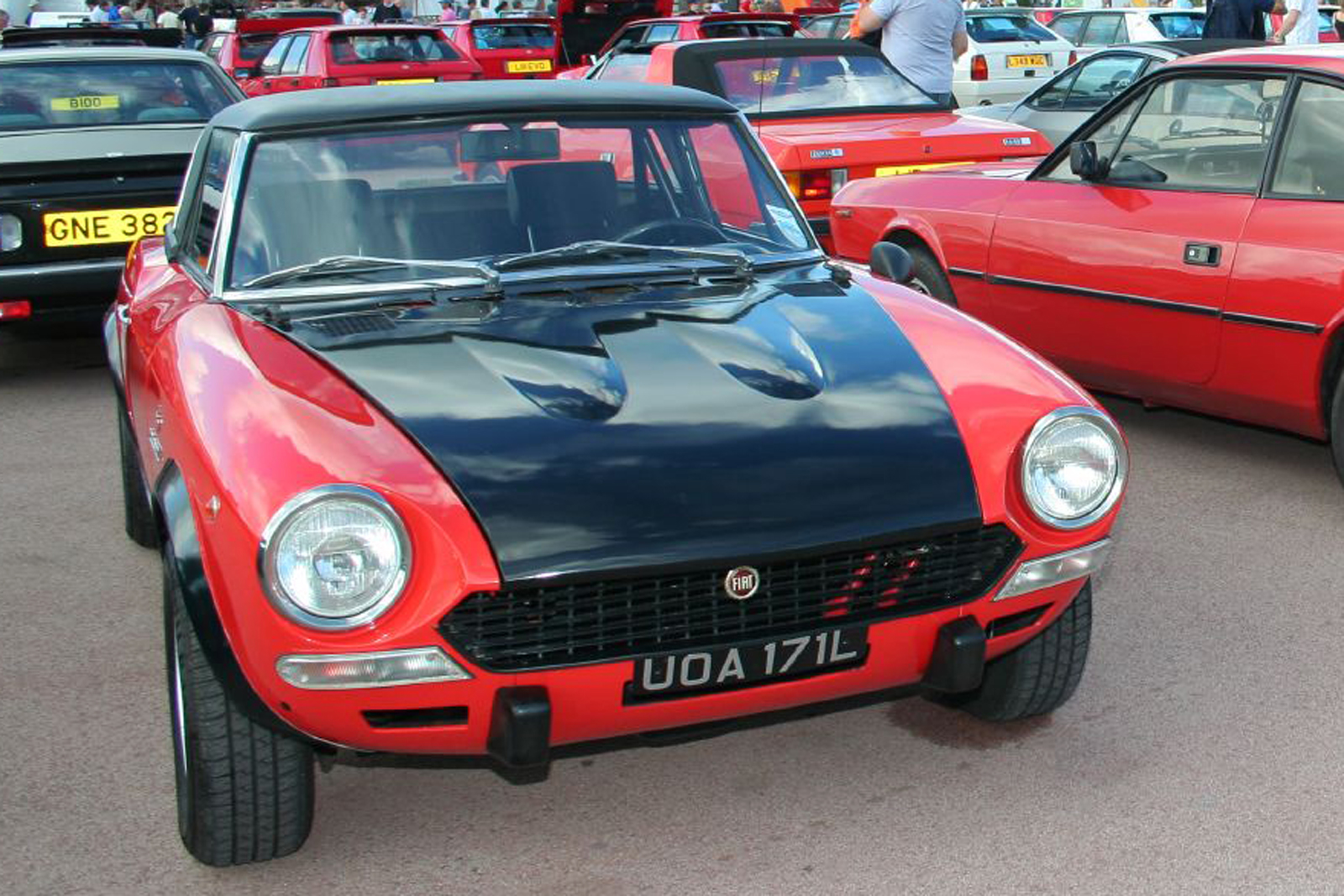 Fiat 124 Abarth Rally (1972-1976), versione stradale